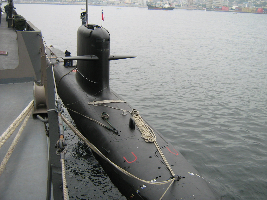 Submarino ss Ohiggins